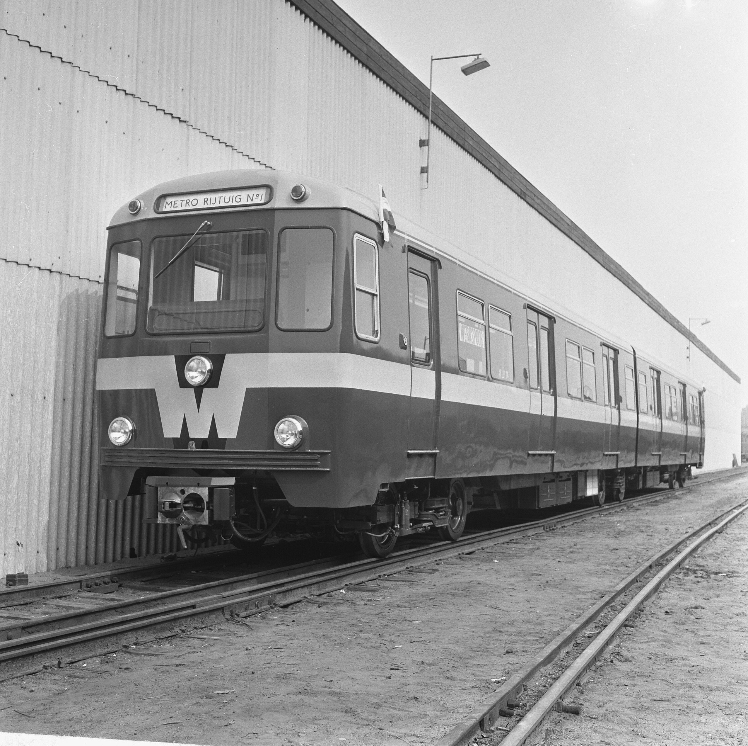 Collectie / Archief : Fotocollectie Anefo Reportage / Serie : [ onbekend ] Beschrijving : Eerste Metro-treinset voor Rotterdam klaar, exterieur treinstel (bij werkspoor Utrecht) Datum : 17 mei 1966 Locatie : Rotterdam, Utrecht Trefwoorden : metro's Instellingsnaam : VMF-Stork Fotograaf : Voets, Jan / Anefo Auteursrechthebbende : Nationaal Archief Materiaalsoort : Negatief (zwart/wit) Nummer archiefinventaris : bekijk toegang 2.24.01.03 Bestanddeelnummer : 919-1611